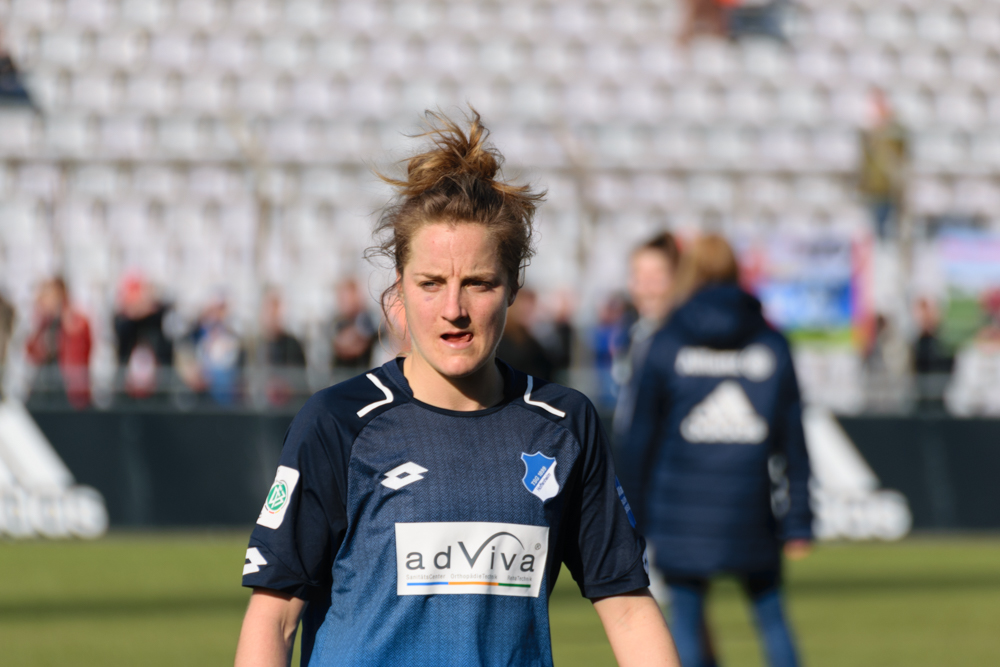 Sophie Howard at FC Bayern vs TSG Hoffenheim